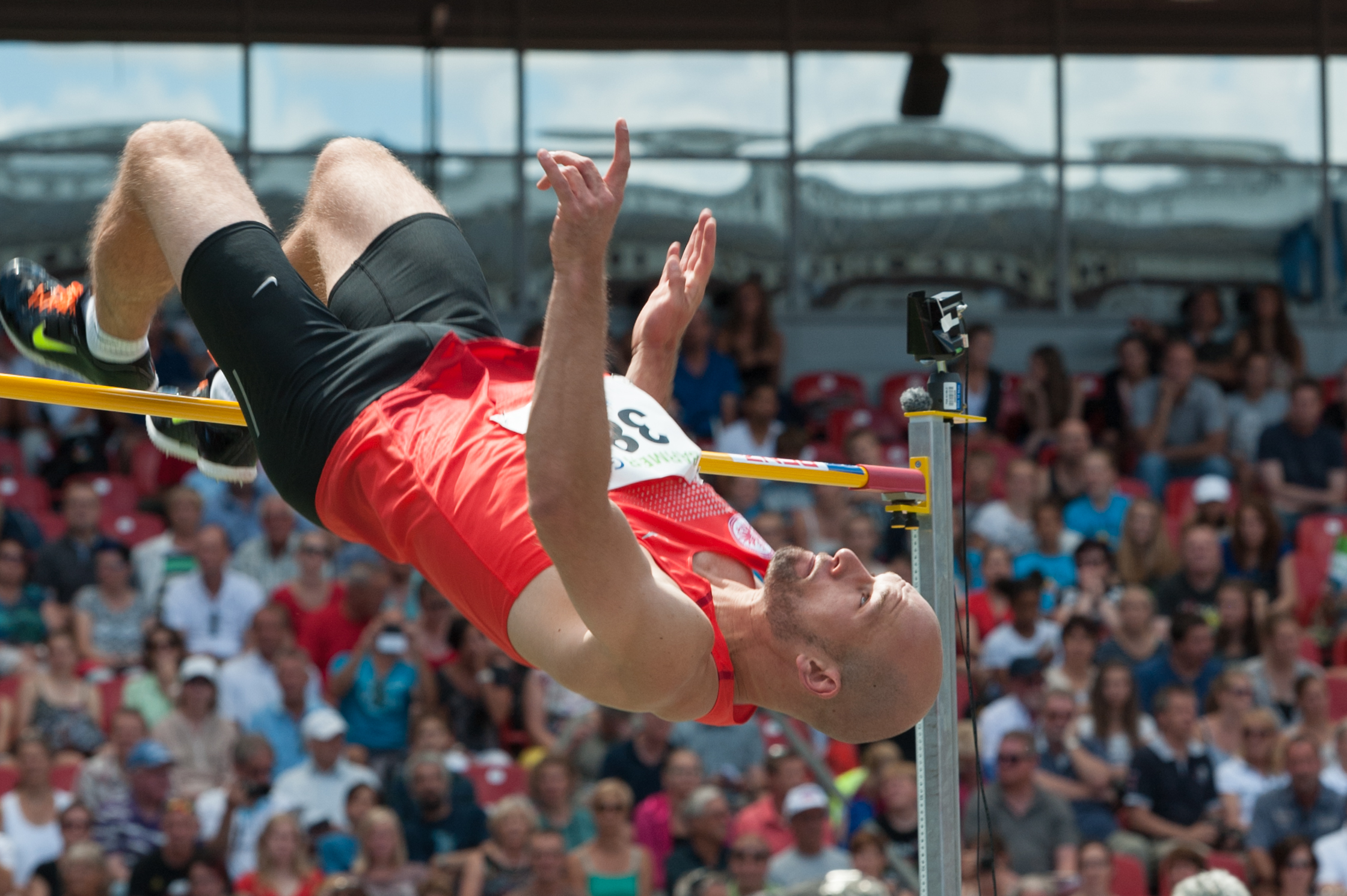 Deutsche Leichtathletik-Meisterschaften 2015: Männer Hochsprung - Martin Günther, LG Eintracht Frankfurt